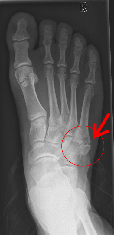 Pseudarthrose